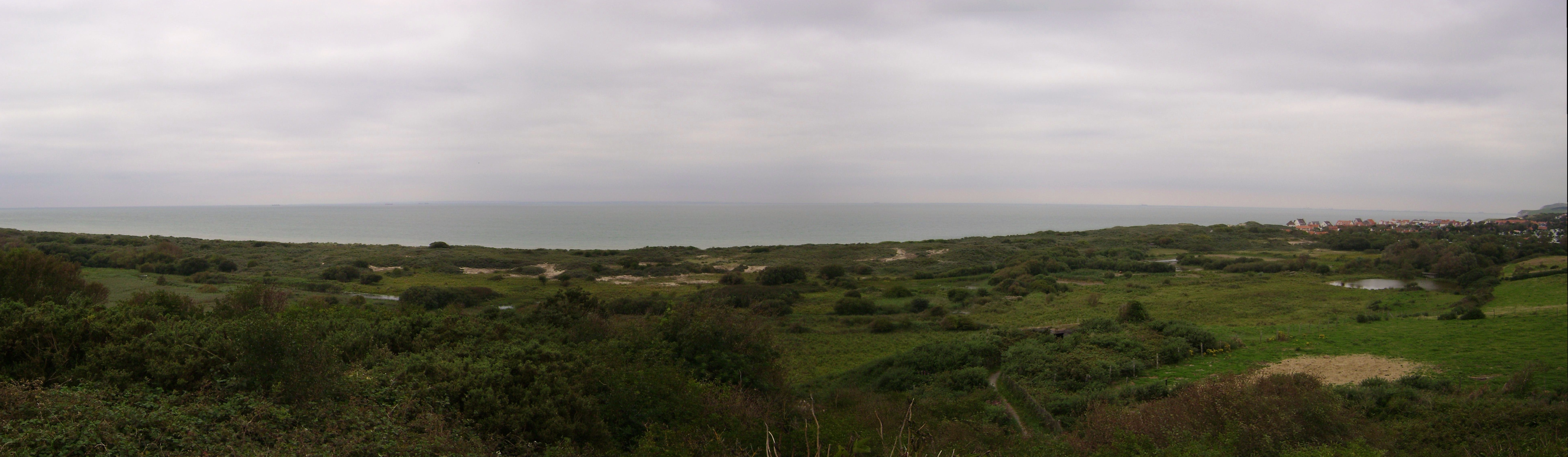 Panorama de Wissant